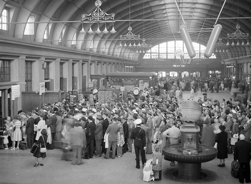 Köbildning i Centralstationens hall